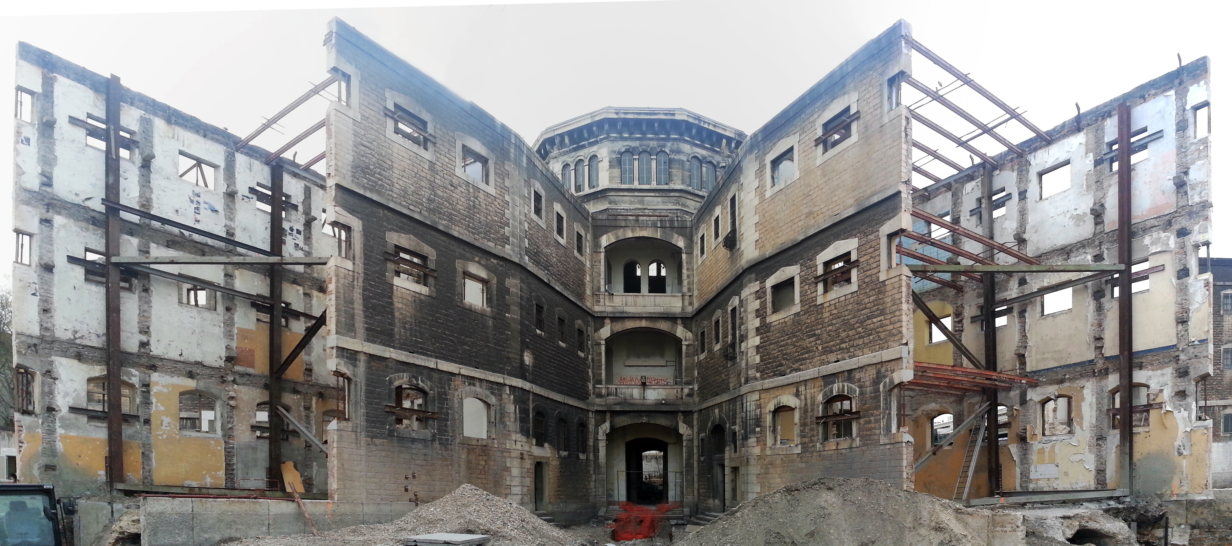 Panorama de la prison Saint-Paul de Lyon, vue de l'intérieur en cours de réfection, vue de la rue Delandine